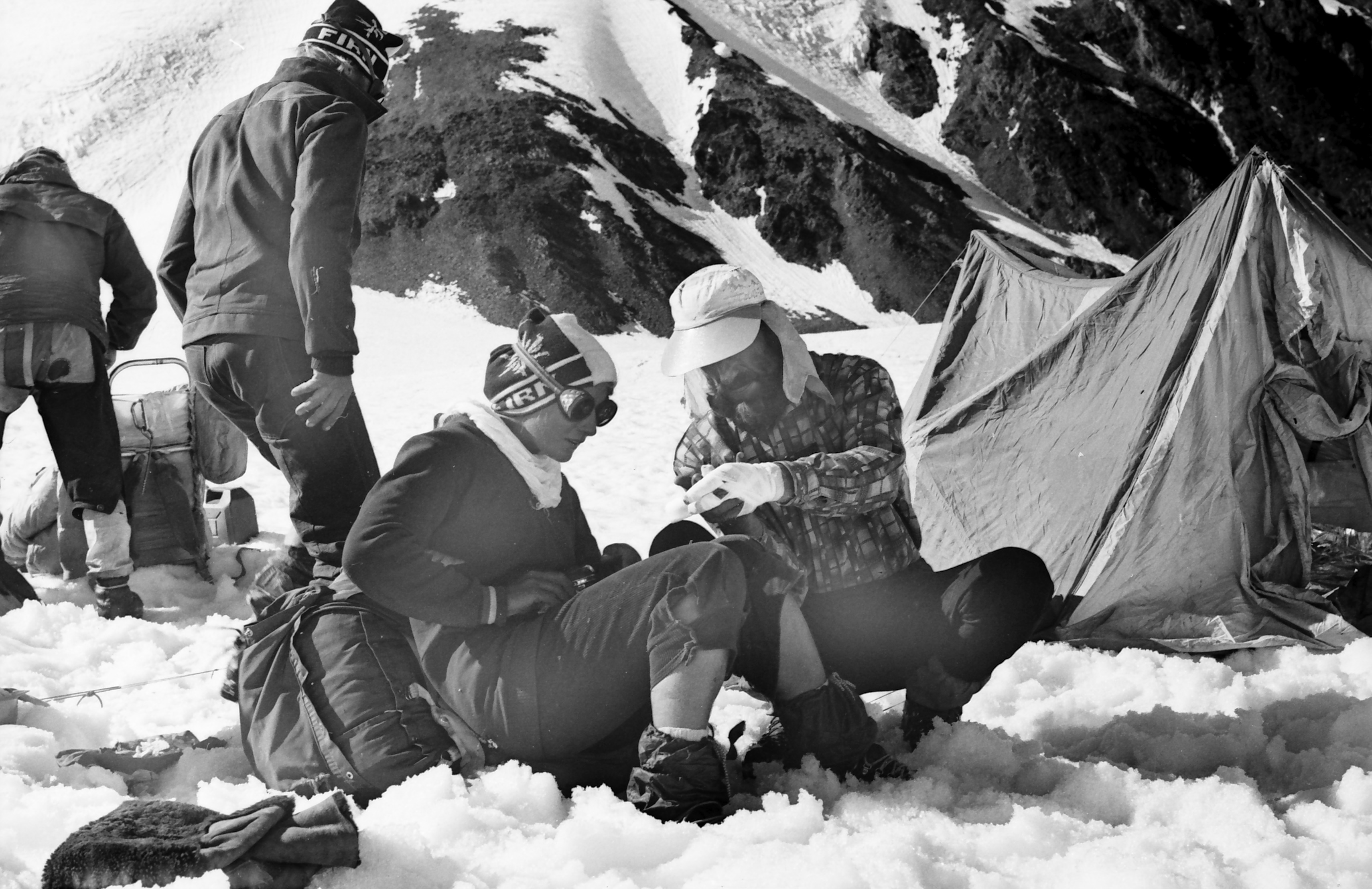 Ekspeditsioon mäetipule "Tartu Ülikool 350". Anu ja Jaak.